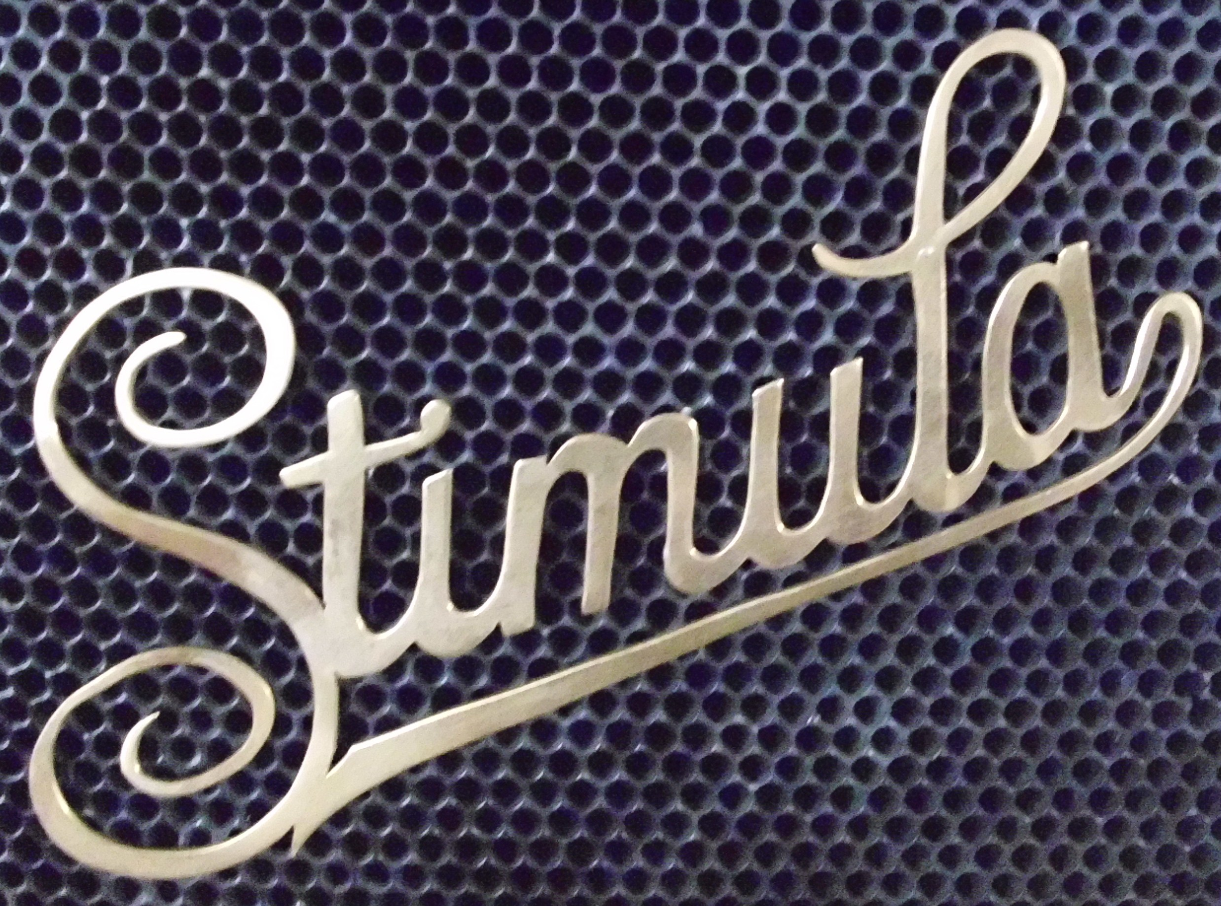 Emblem Stimula